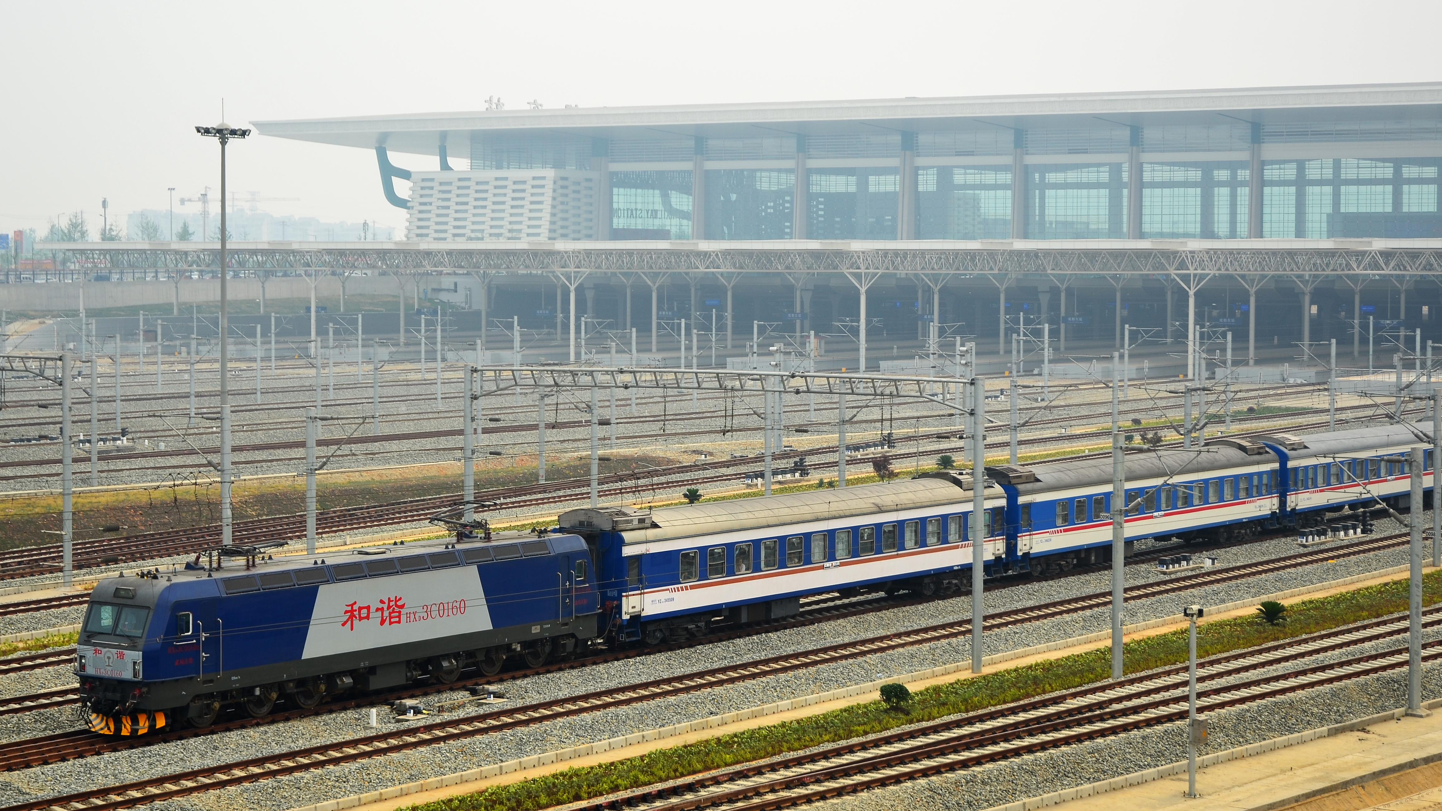 成都东站T252发车